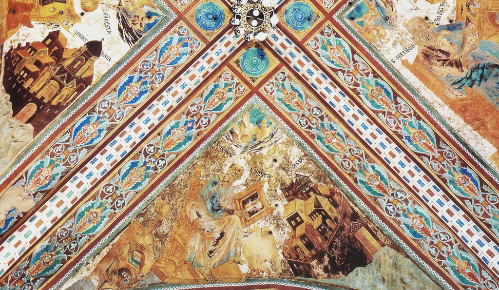 Cimabue, san giovanni